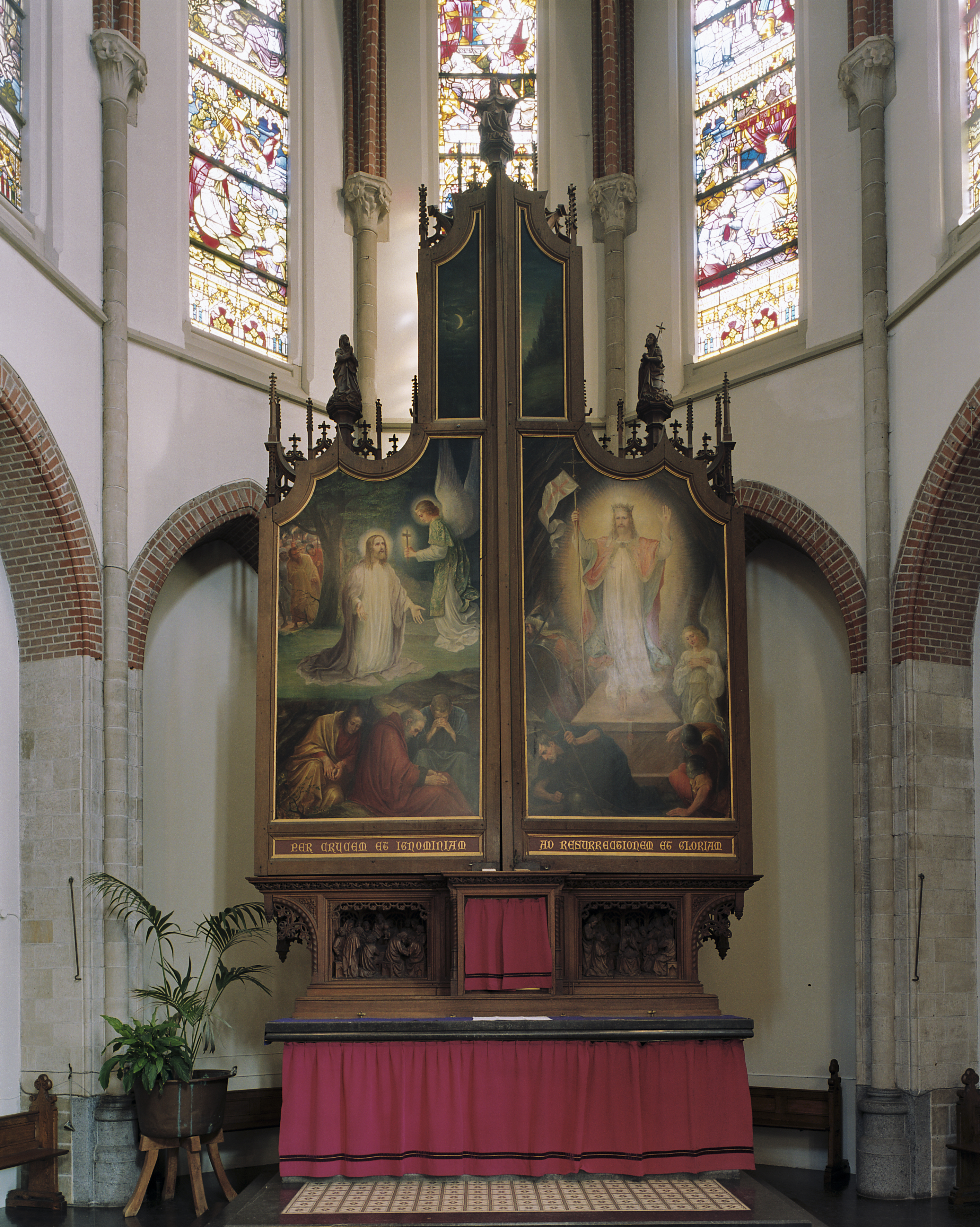 Sint Martinuskerk: Interieur, koor, overzicht hoofdaltaar van H. van der Geld